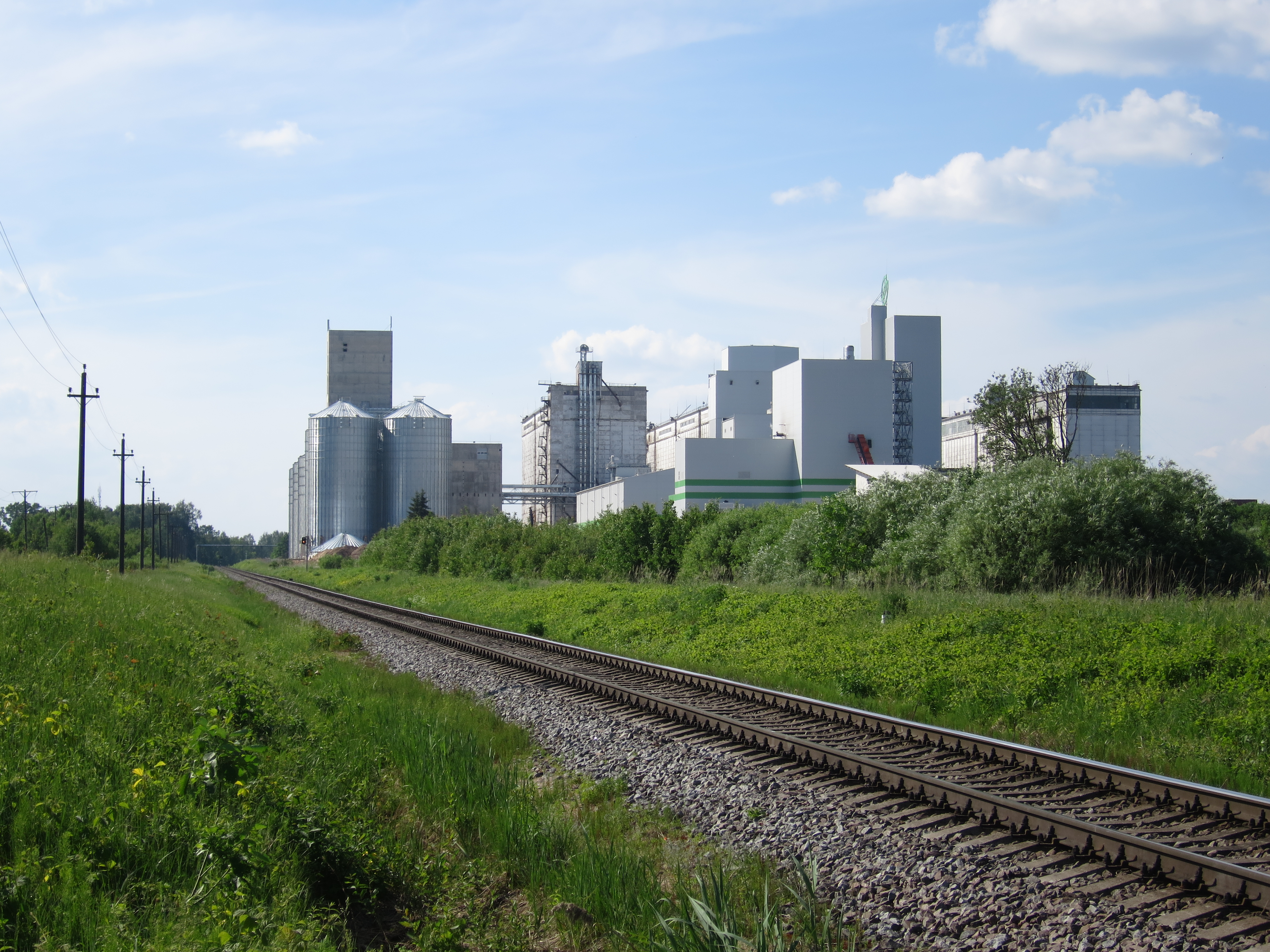 Uzņēmums "Dobeles dzirnavnieks", skatoties no dzelzceļa puses